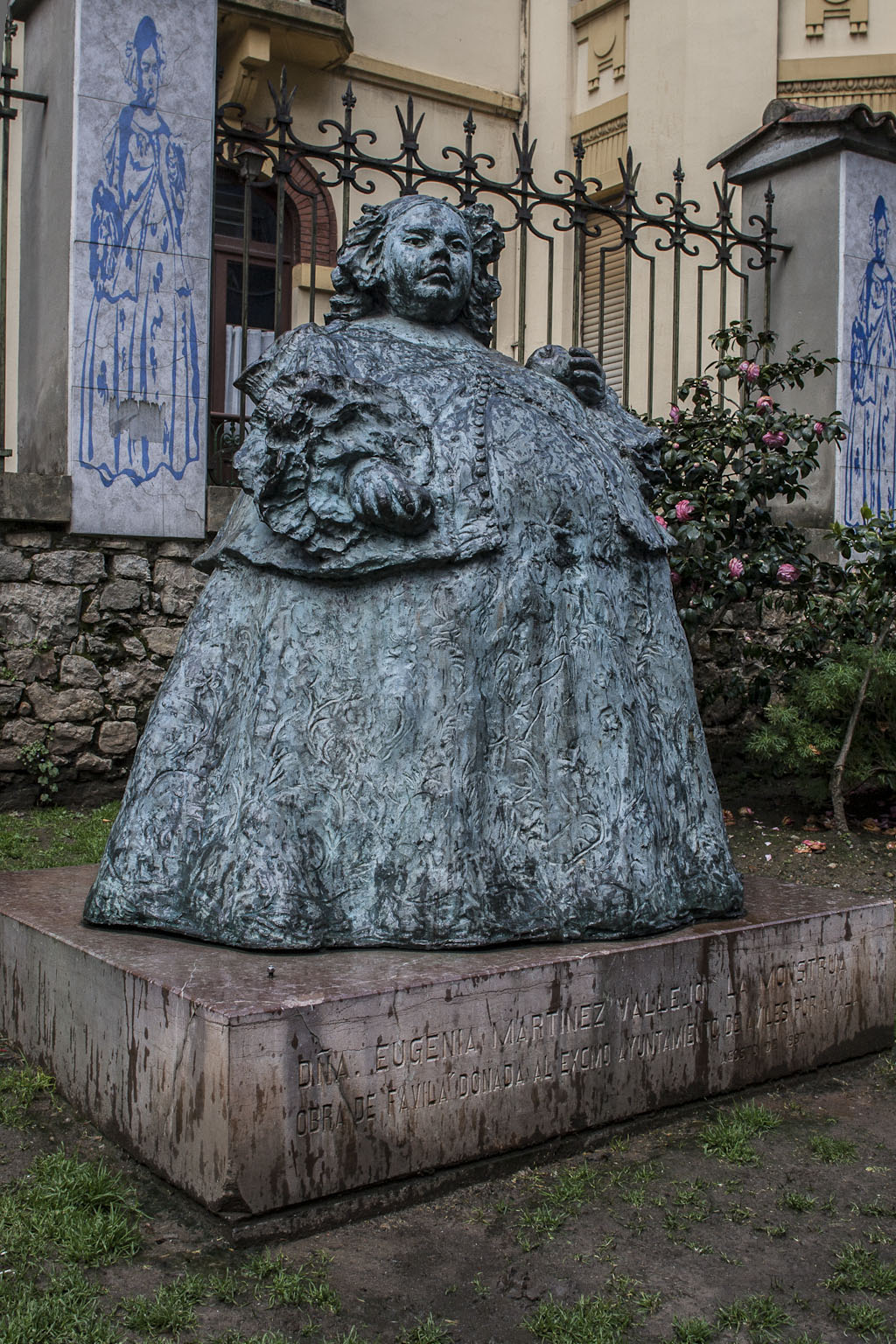 Obra de Amado Fernández Hevia "Favila". Calle Carreño Miranda, Avilés